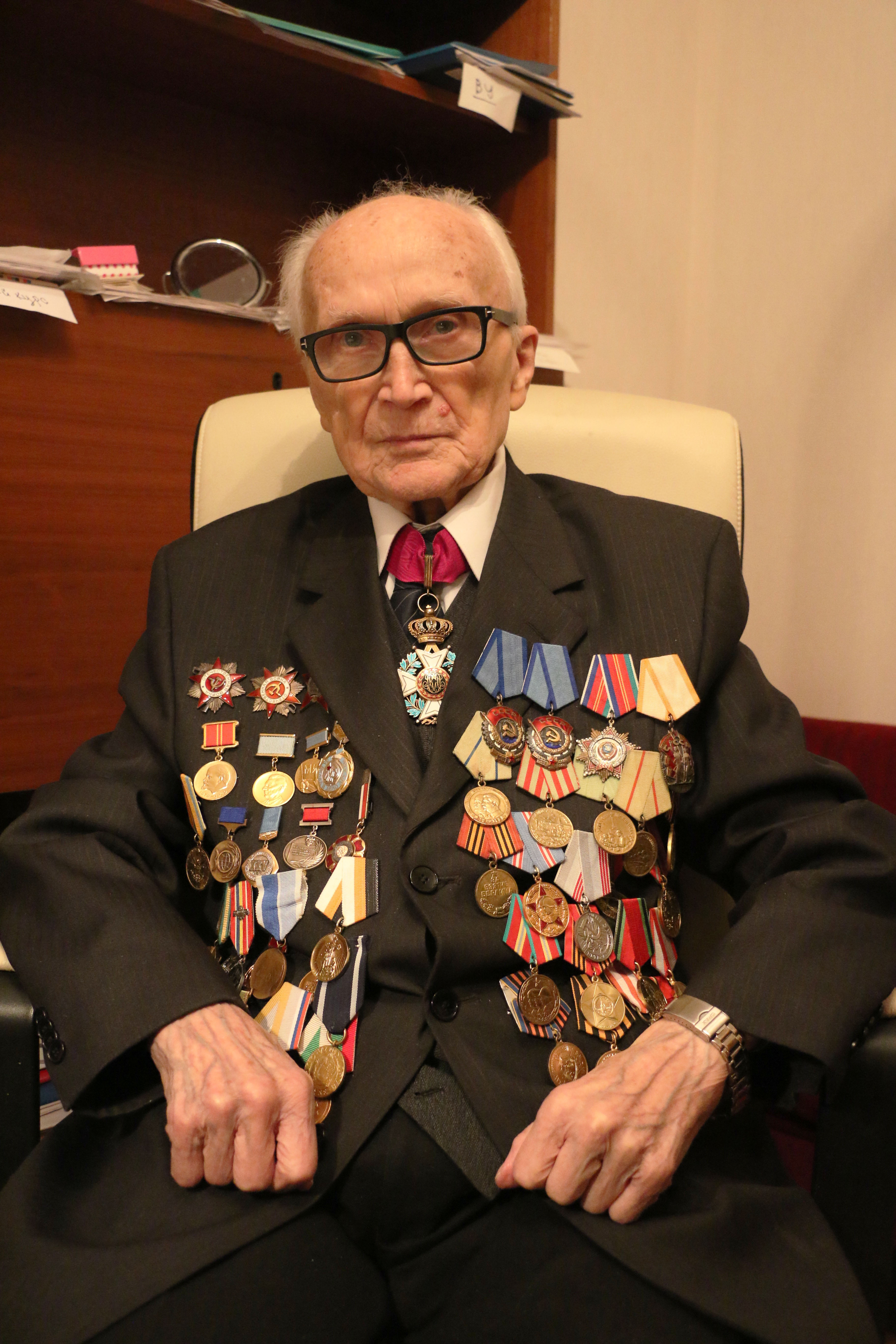 Ломко Яков Алексеевич у себя дома. Октябрь 2016 года.